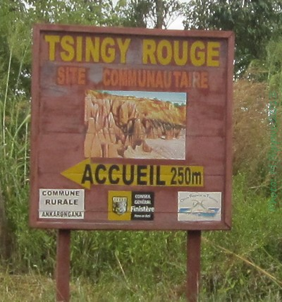 Malagasy: Tsingy Rouge-Ankarangona